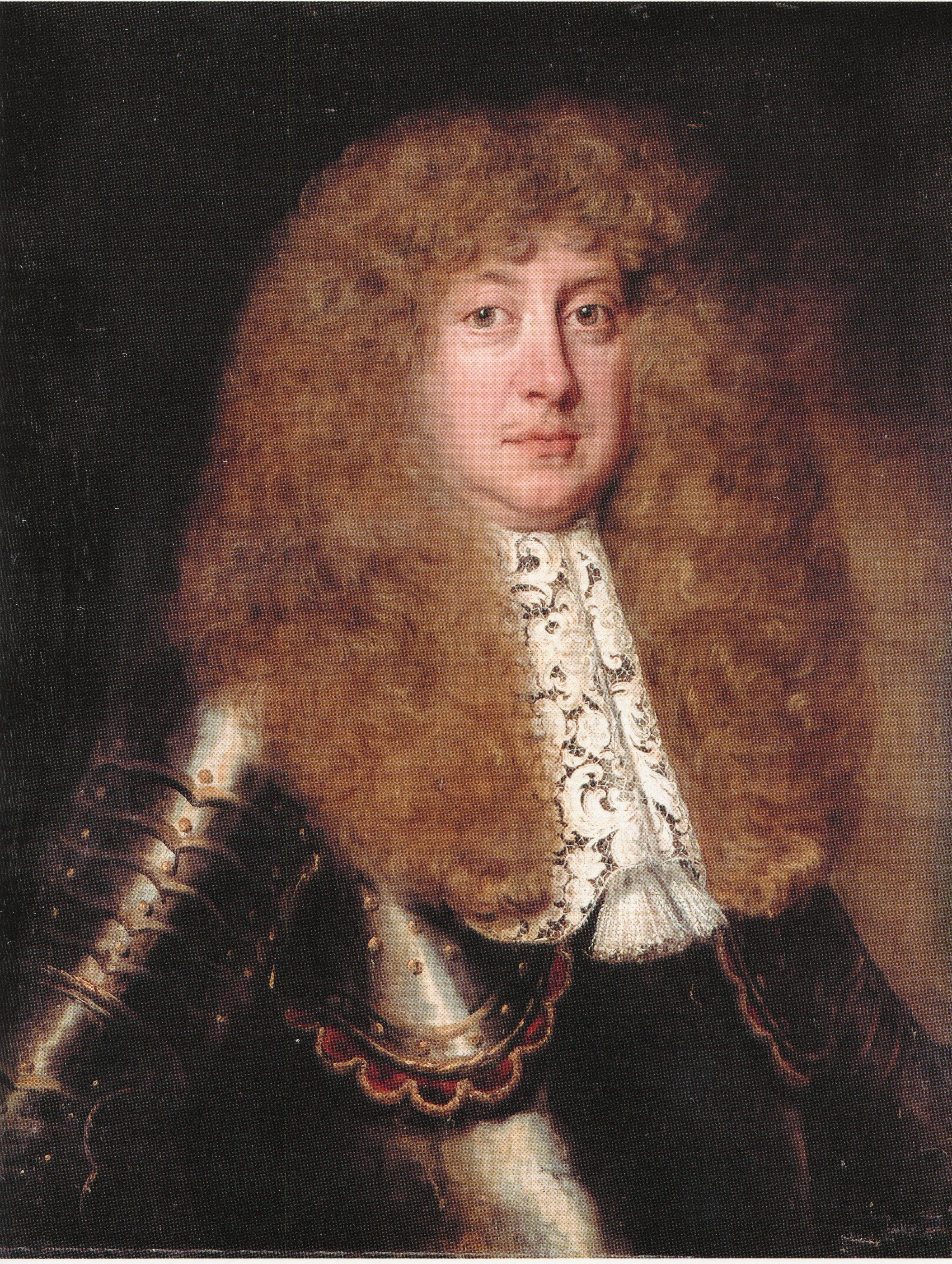 Portrait von Herzog Ernst August von Braunschweig-Lüneburg (1629-1698)